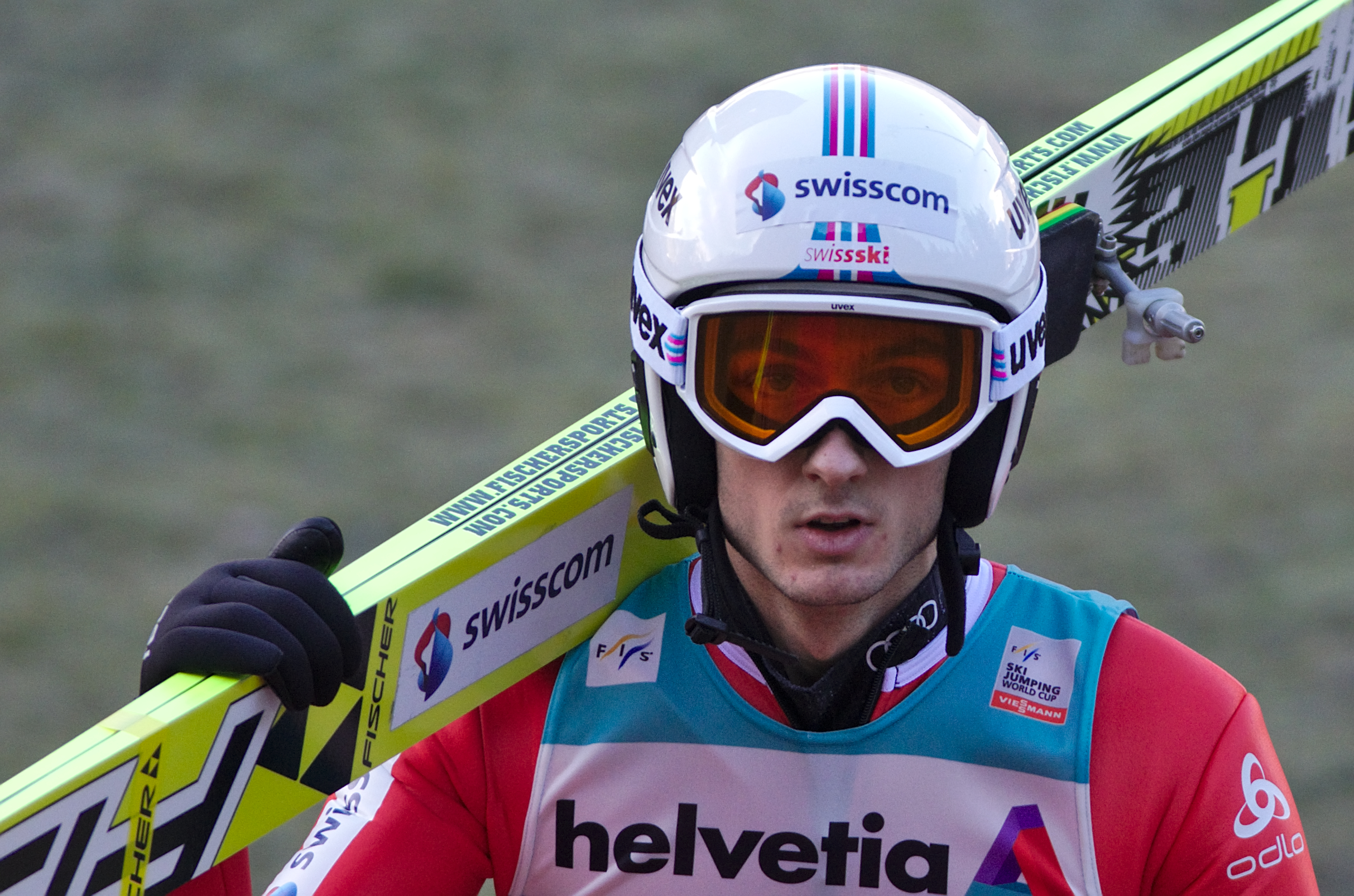 FIS Ski Jumping World Cup 2014 - Engelberg - 20141221 - Killian Peier